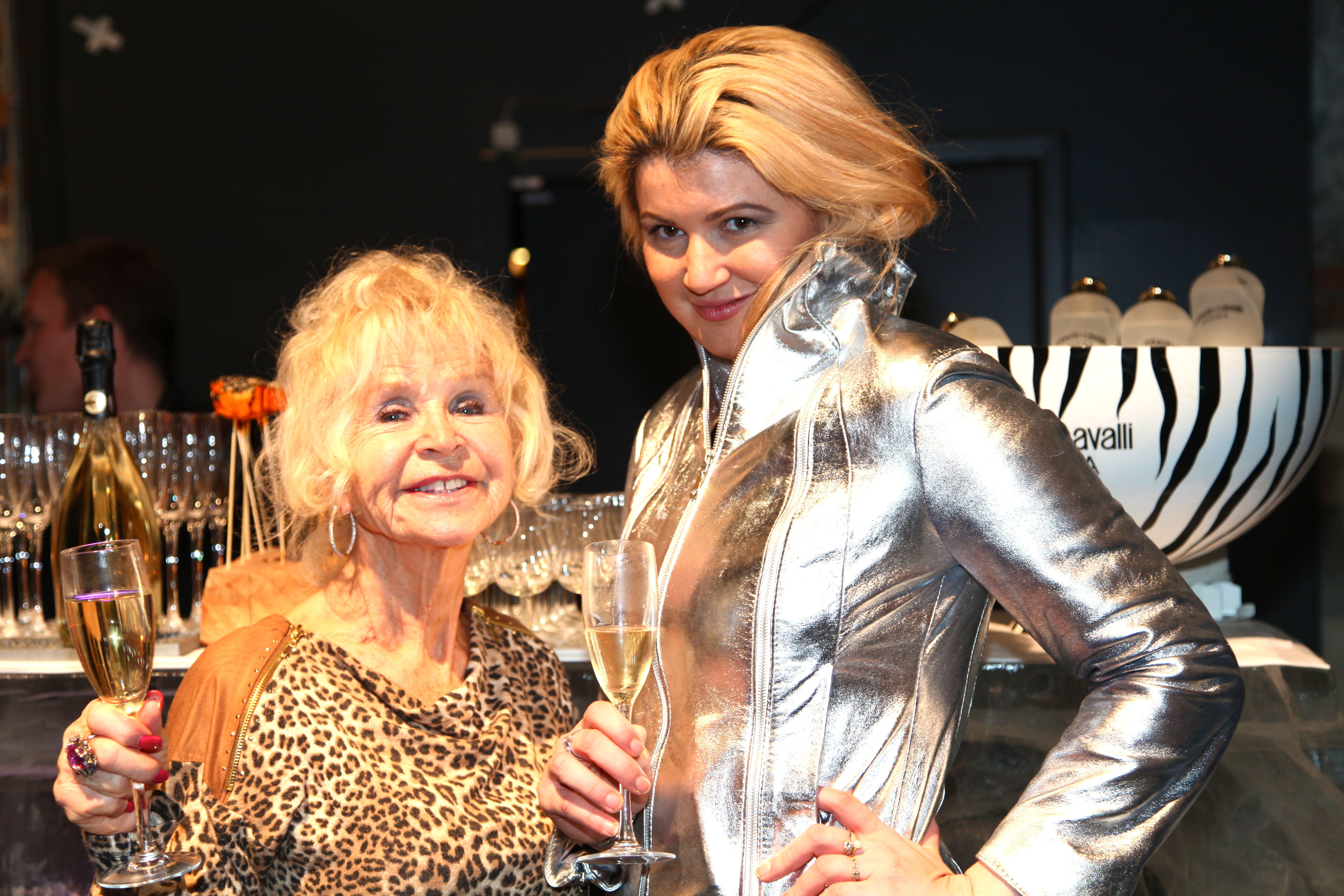 Edna Falao med Camilla Ove på Roberto Cavalli Event Februar 2012